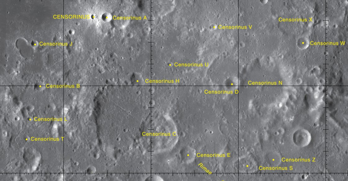 Cráteres Satélite del Cráter Censorinus (LAC-79)